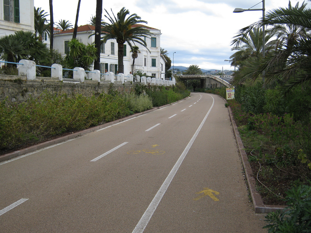 Pista ciclabile nei pressi di Sanremo, realizzata sul vecchio sedime ferroviario